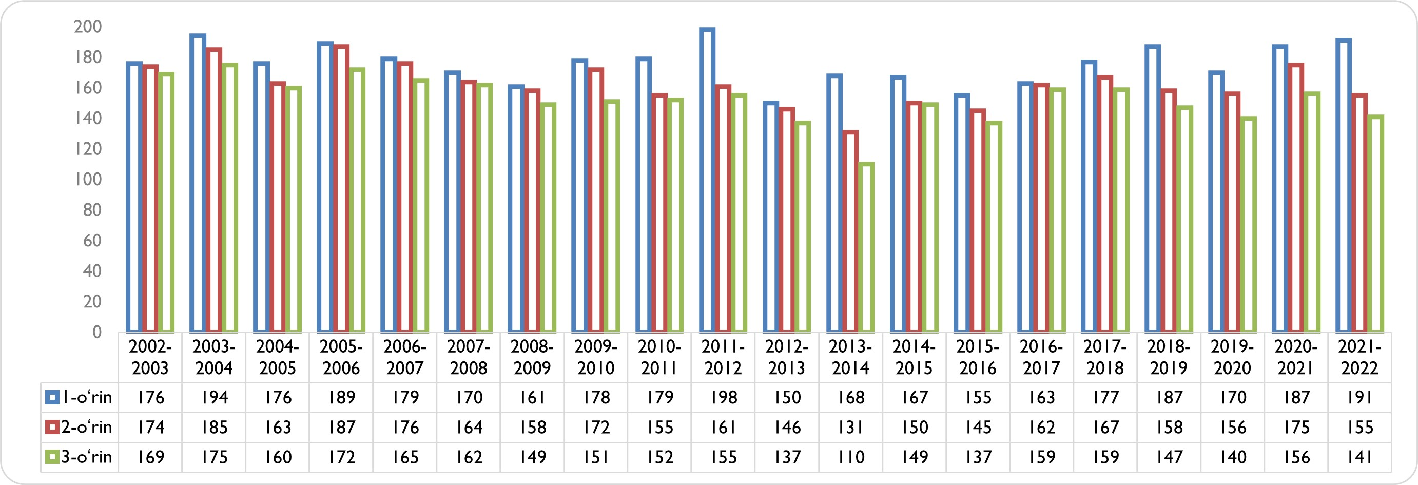 Oʻzbekcha/ўзбекча: Oʻzbek gimnaziyasi bitiruvchilarining umumrespublika testida olgan eng yuqori ballari